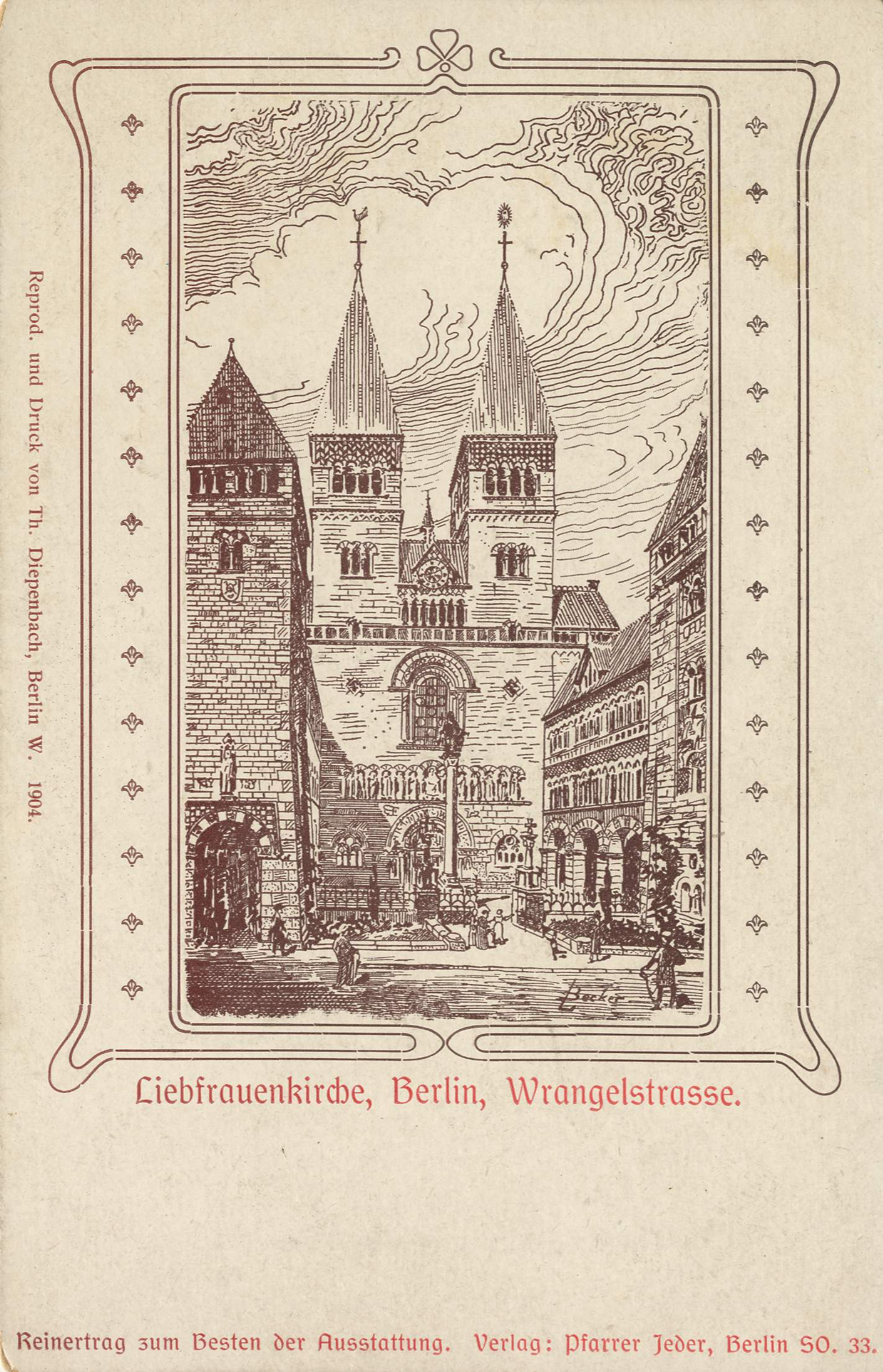 St. Marienkirche (Liebfrauenkirche), Wrangenstraße, Berlin-Kreuzberg